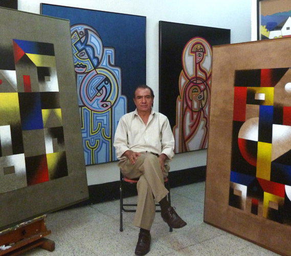 Artista Rudy Cotton en su taller, Marzo 2014